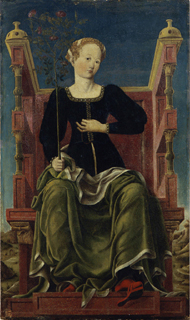 Studiolo di Belfiore, Erato di Angelo Maccagnino e collaboratori di Cosmè Tura